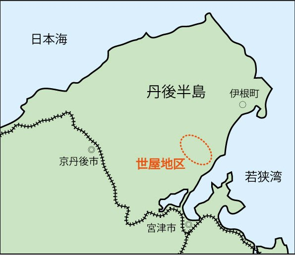 京都府宮津市世屋地区の場所を示した地図